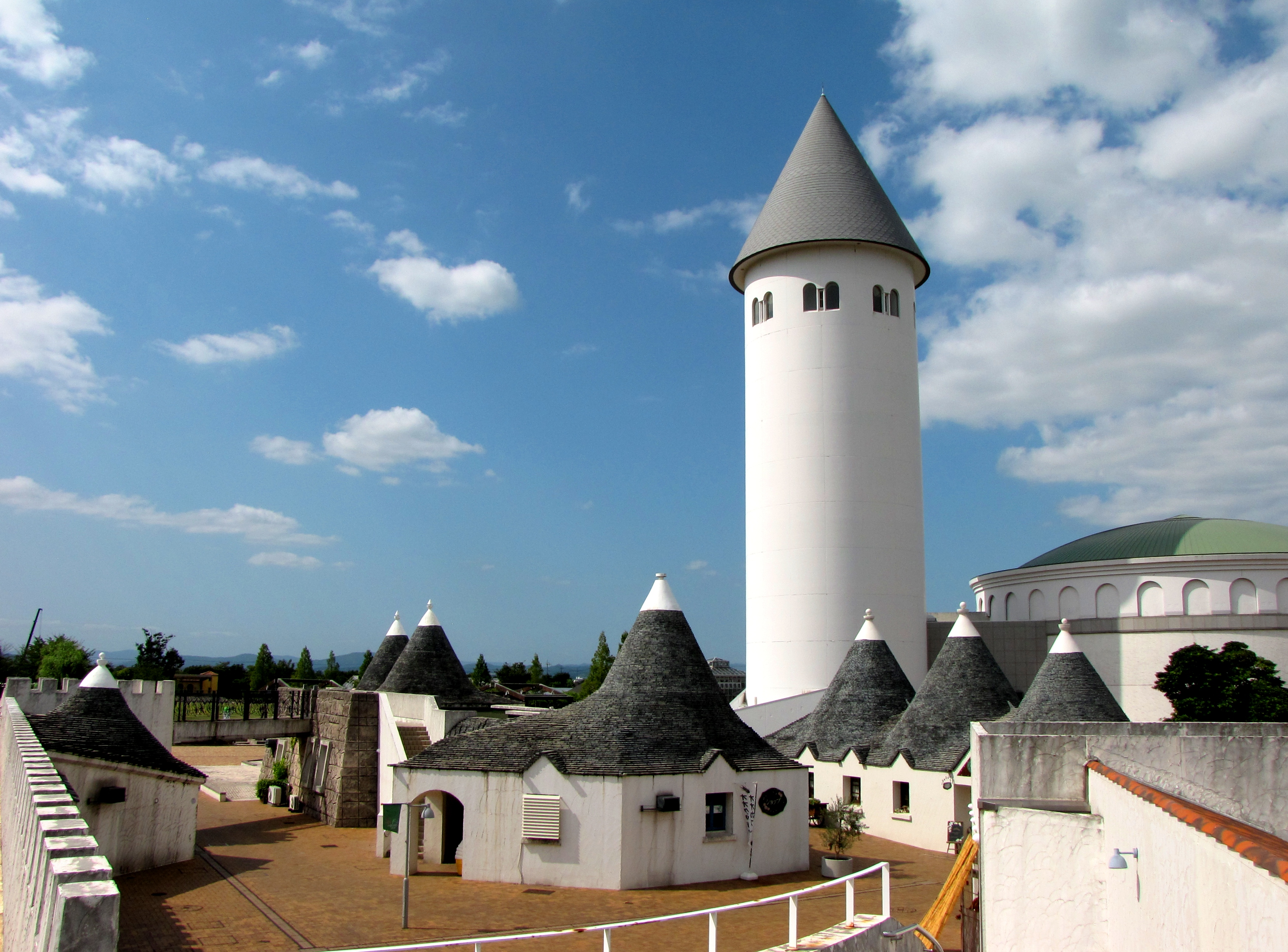 岡山市サウスヴィレッジ（旧・おかやまファーマーズ・マーケット サウスヴィレッジ）